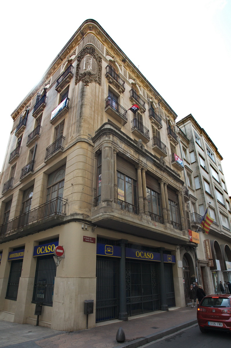 Edifici El Ocaso (Reus)